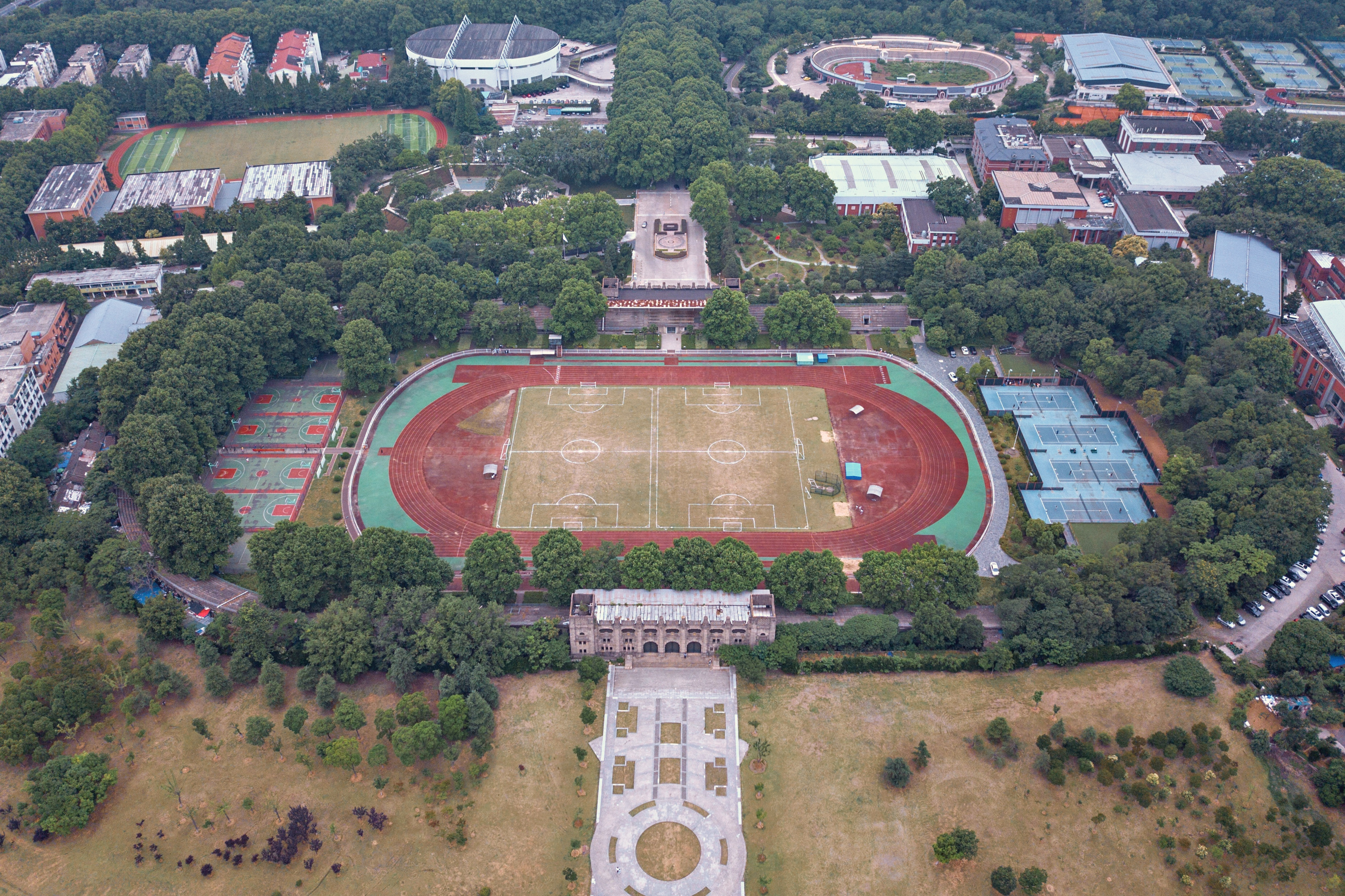 中文（中国大陆）: 中央体育场